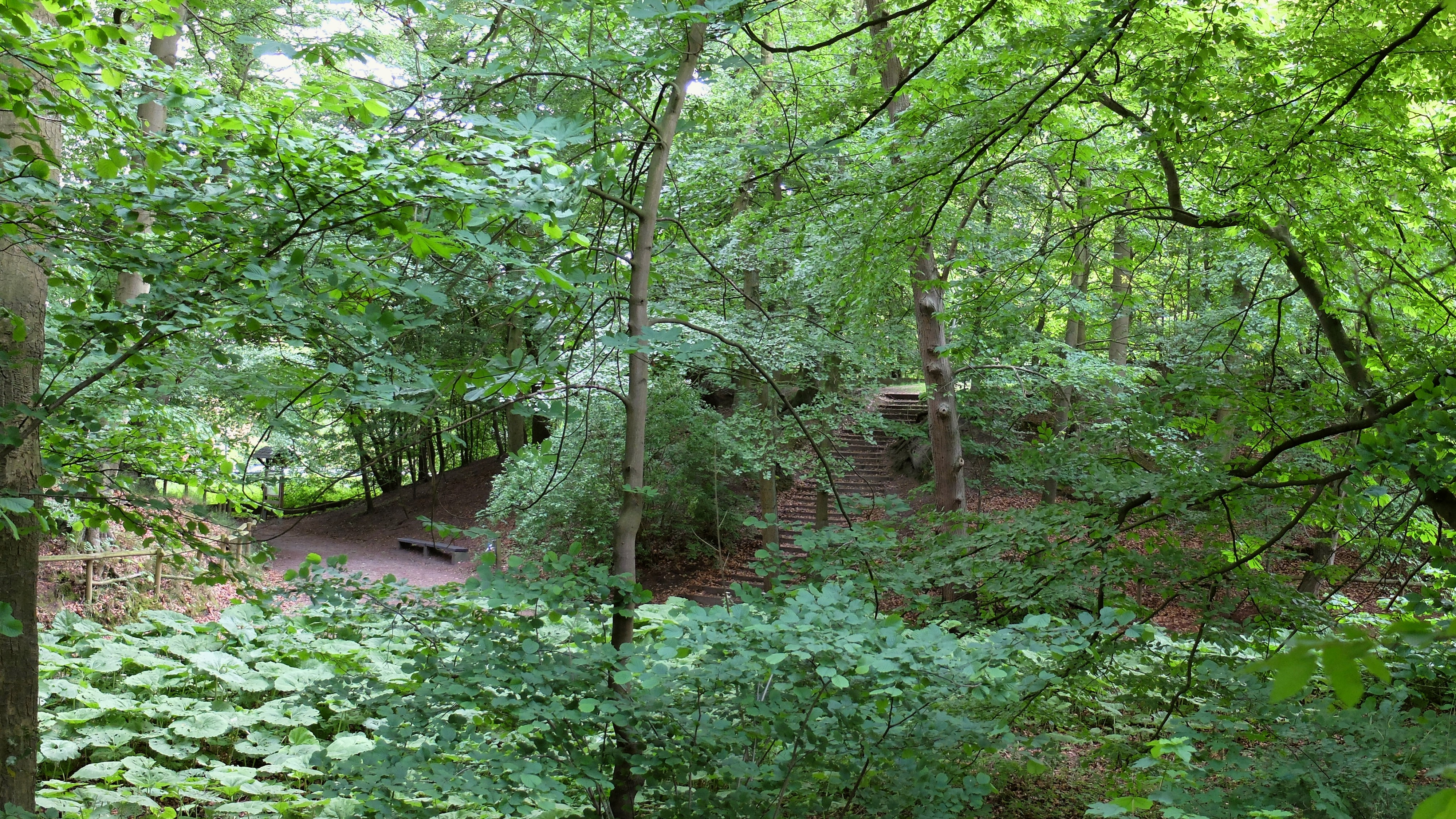 Einer der "Berge" im NSG Dreibergen, Bad Zwischenahn